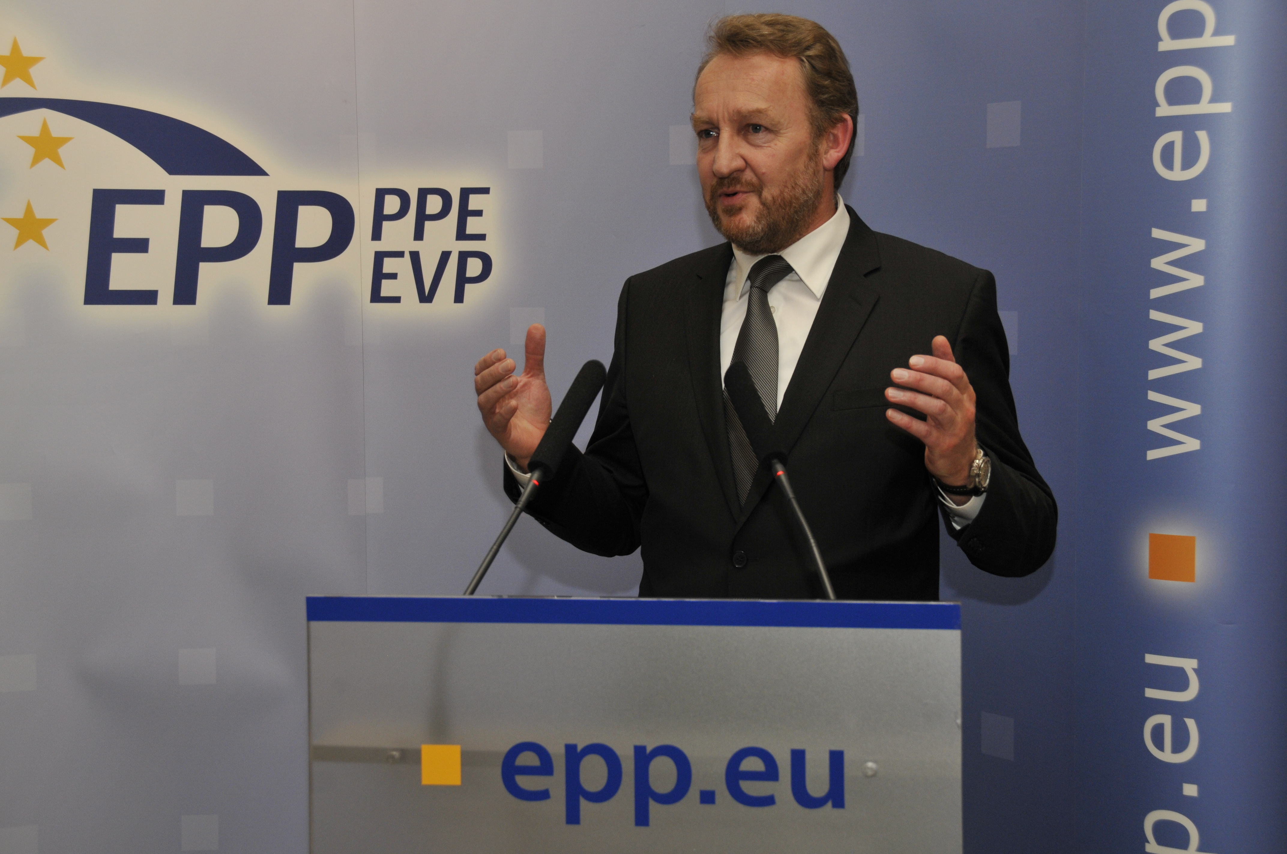 EPP Summit December 2010